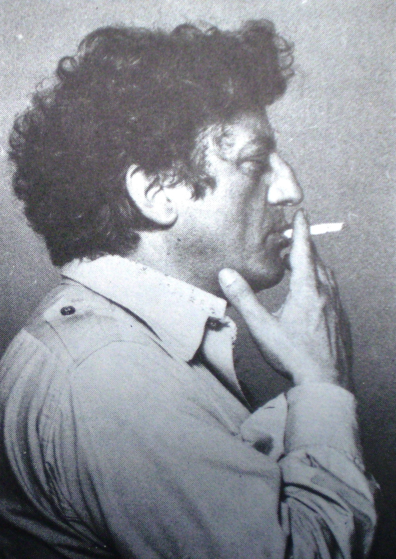 Rómulo Macció